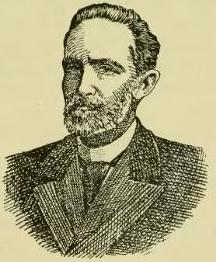 Luis Vianna